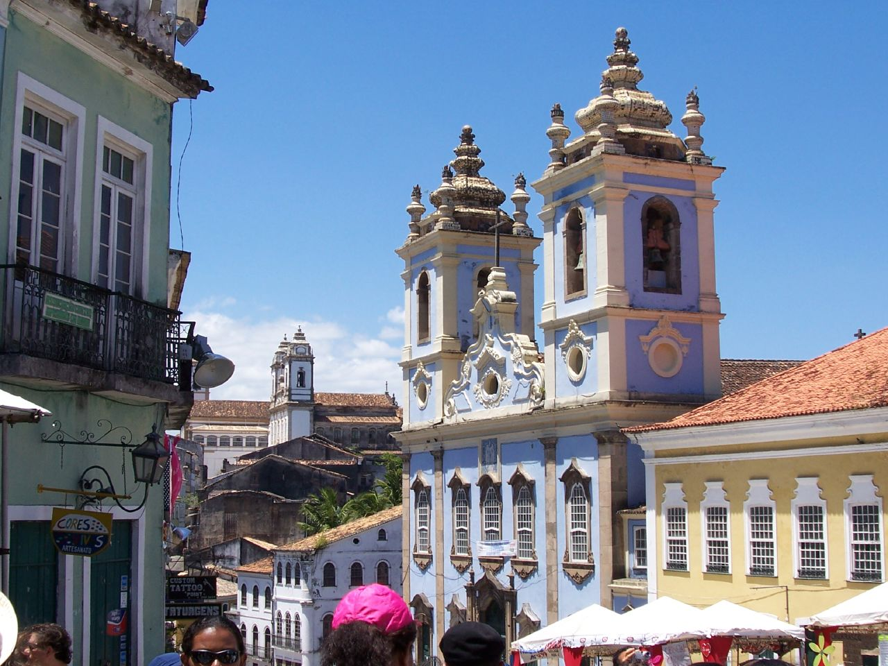 Pelourinho in Salvador, Bahia, Brazil